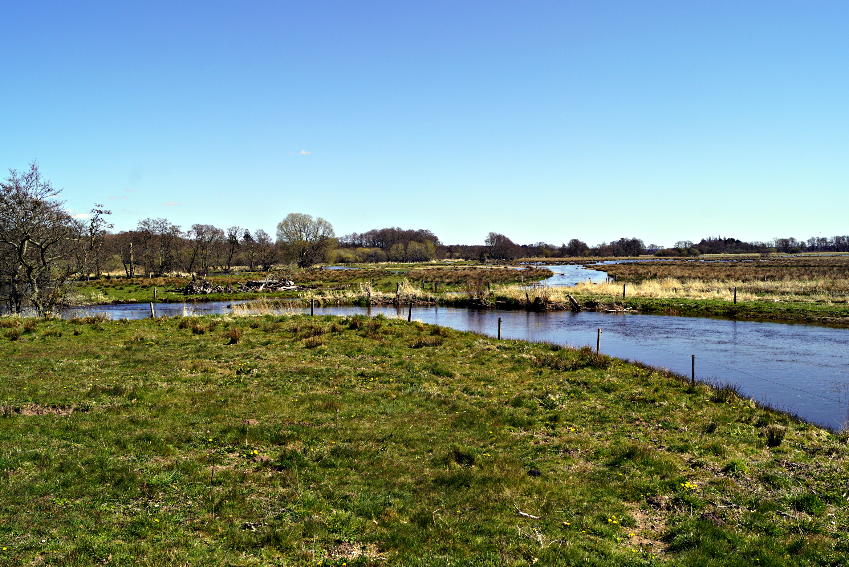 Gudenåen ved Klostermølle, Døde Å og Klosterkær efter omlægning april 2020 set mod øst